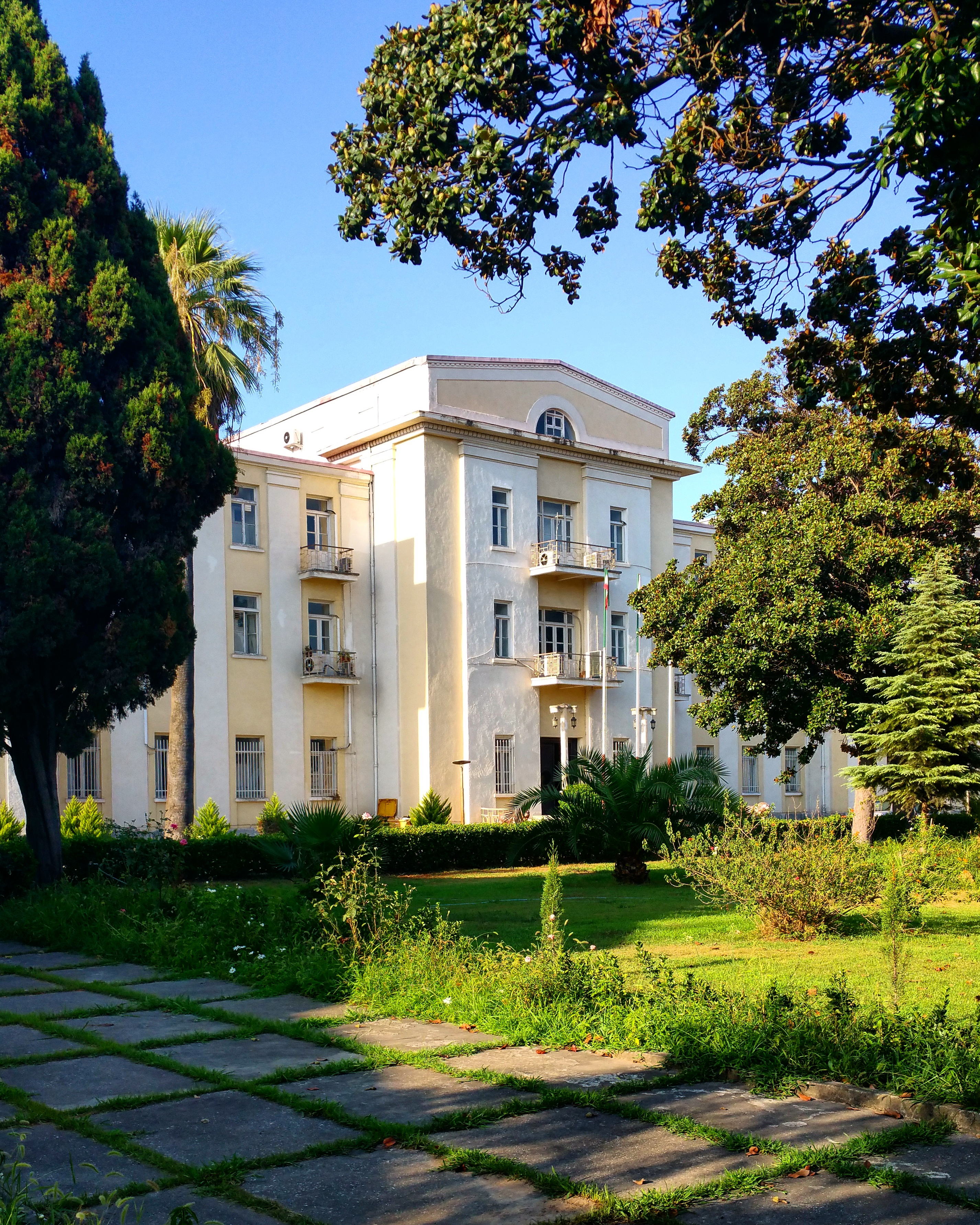 دانشکده ادبیات دانشگاه مازندران